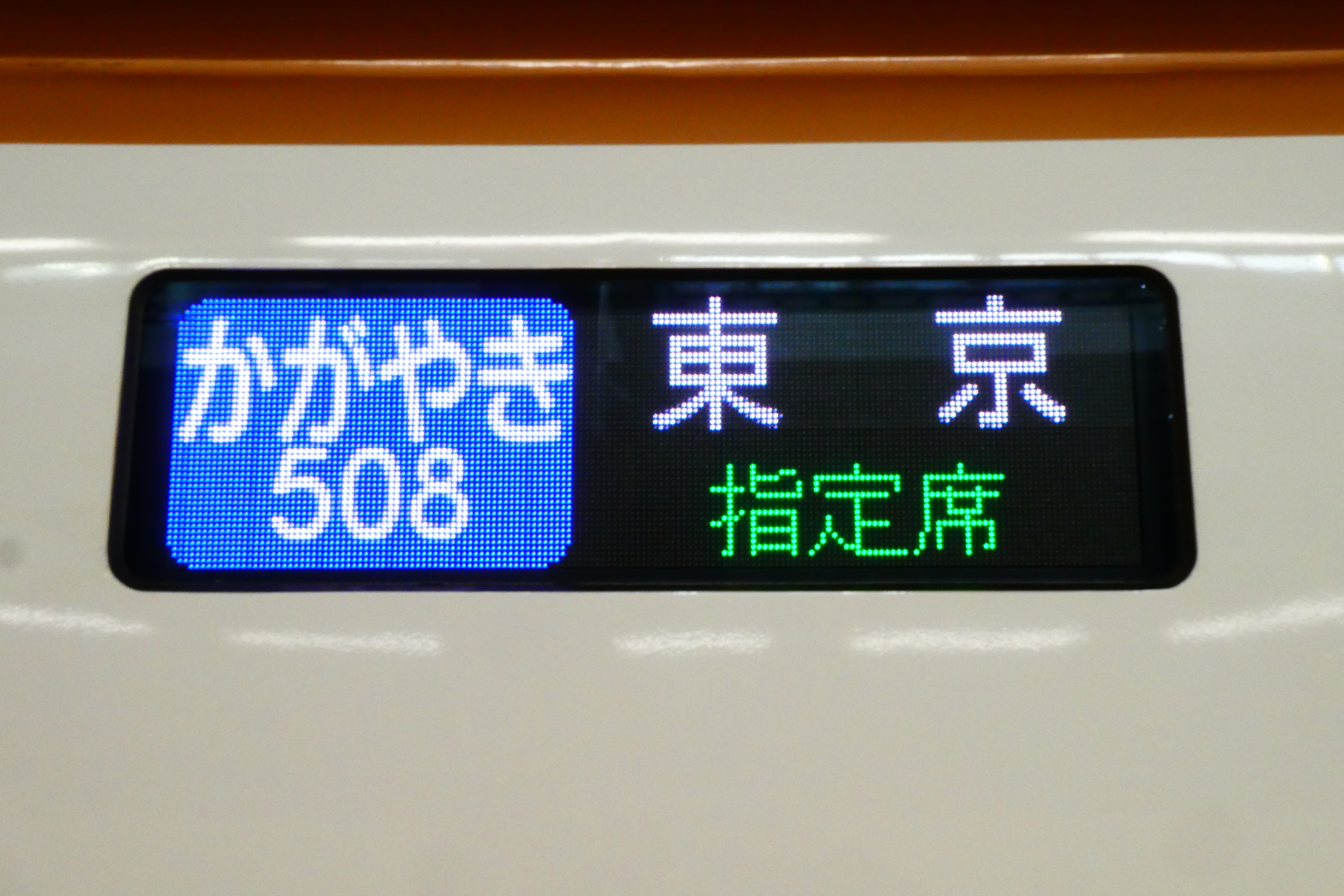 新幹線かがやき号側面LED